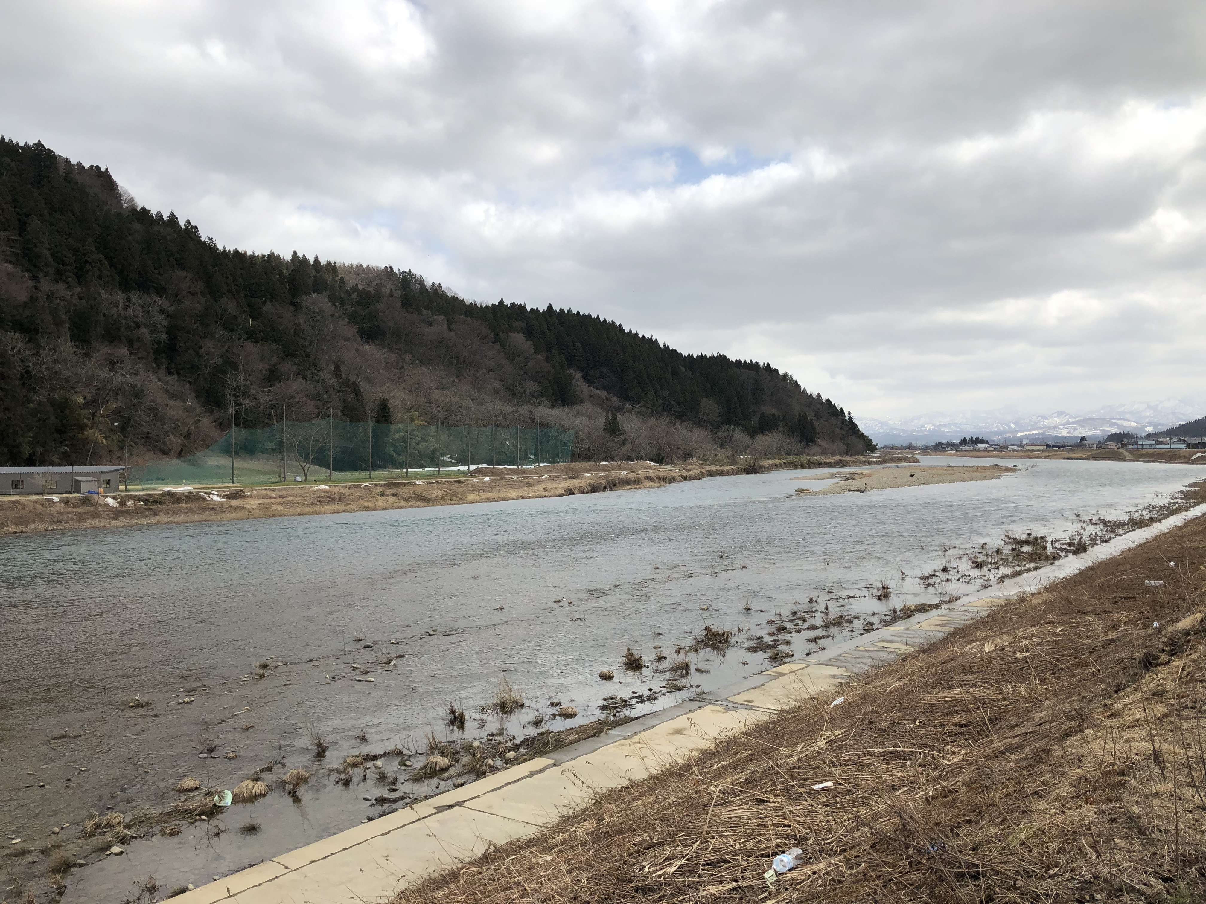 五十嵐川、新潟県三条市で撮影。